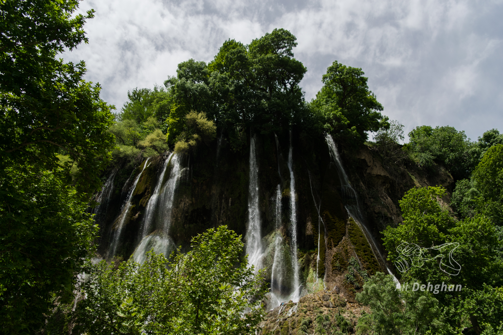 آبشار بیشه